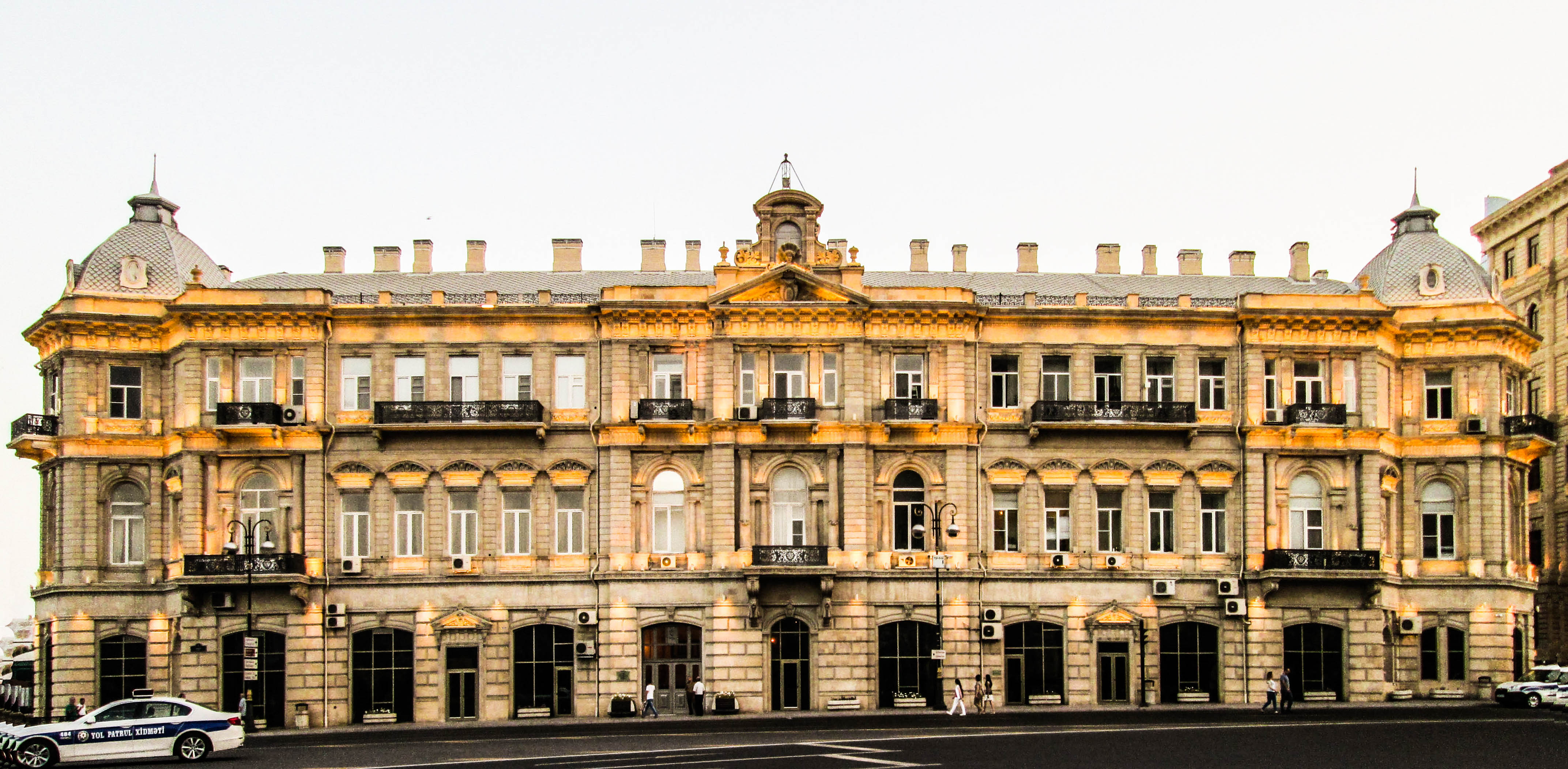 Mirtağı Babayevin sarayı axşam vaxtı